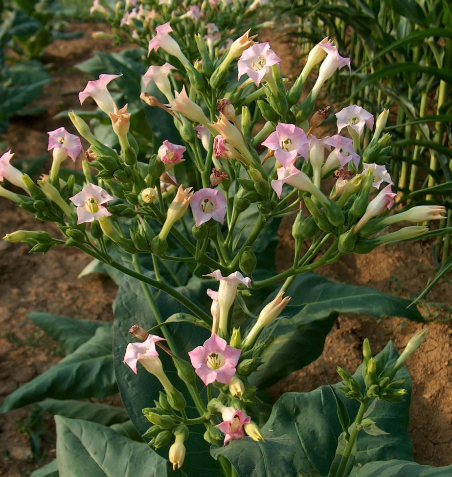 Nicotiana tabacum Blütenstand einer Tabakpflanze